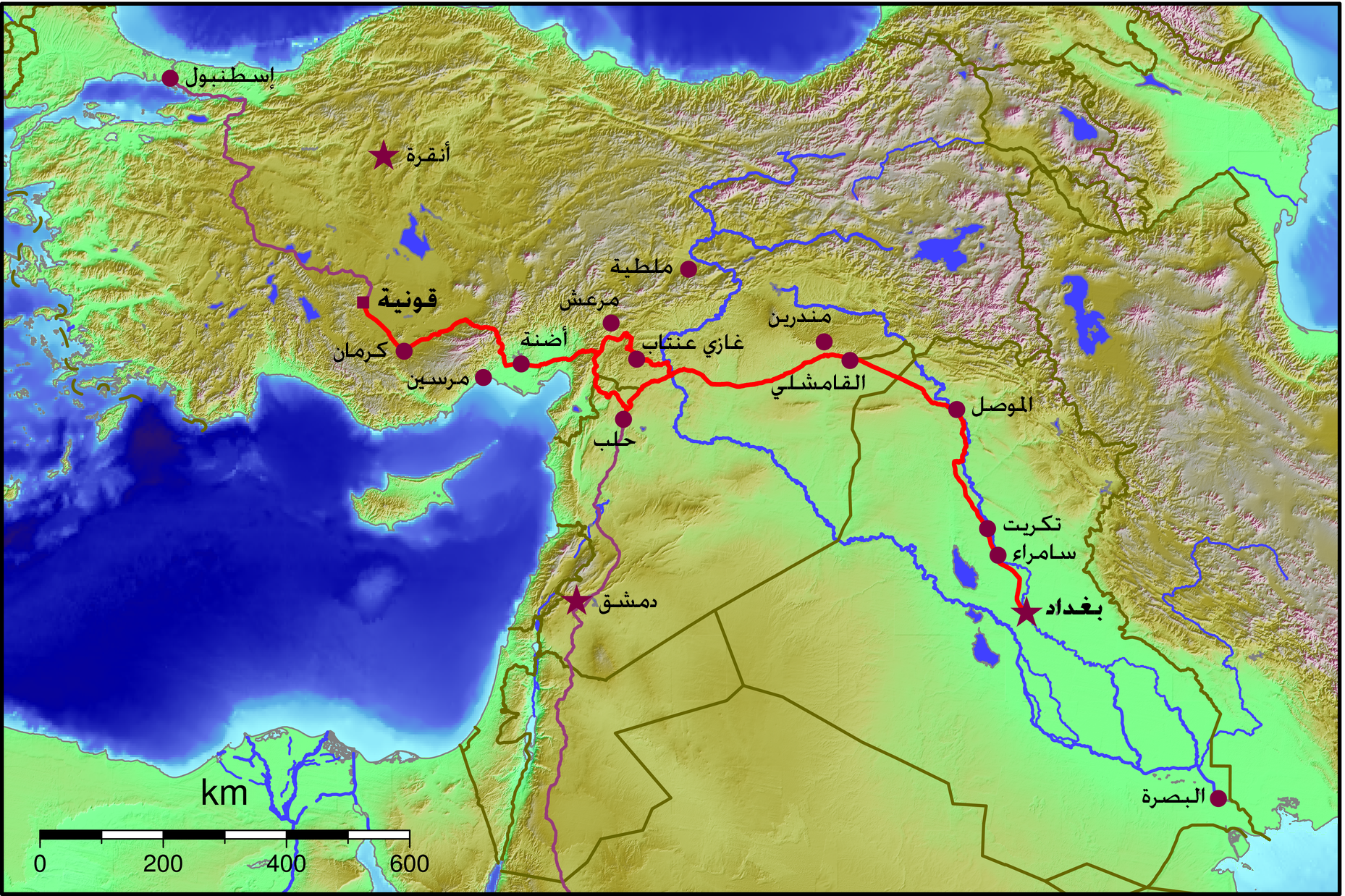 خريطة مسارسكة حديد بغداد 1904–1921